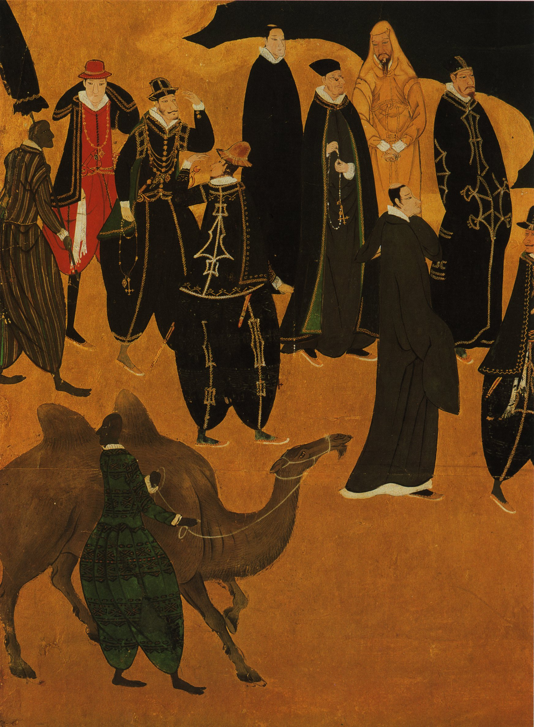 "Namban" art panels detail